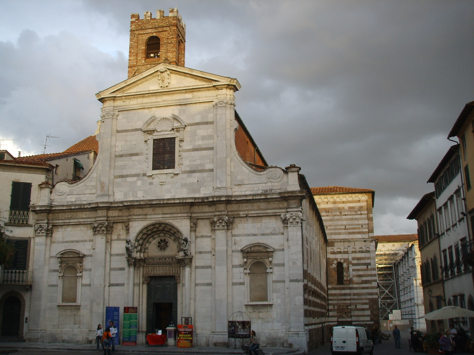 Chiesa dei Santi Giovanni e Reparata